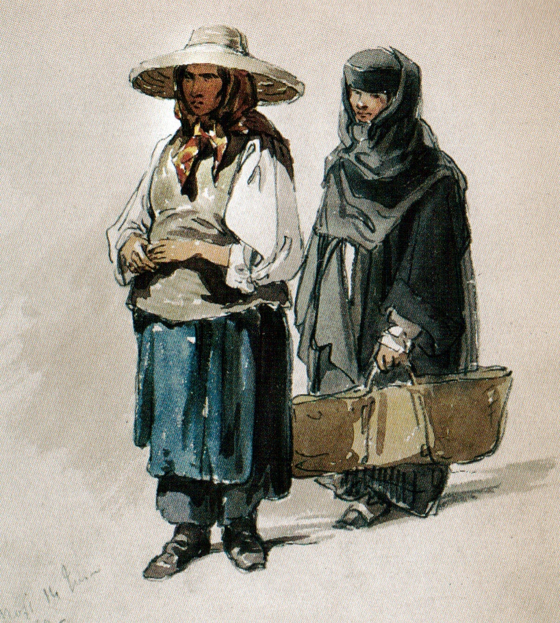 ţărancă şi călugăriţă la Târgul Moşilor